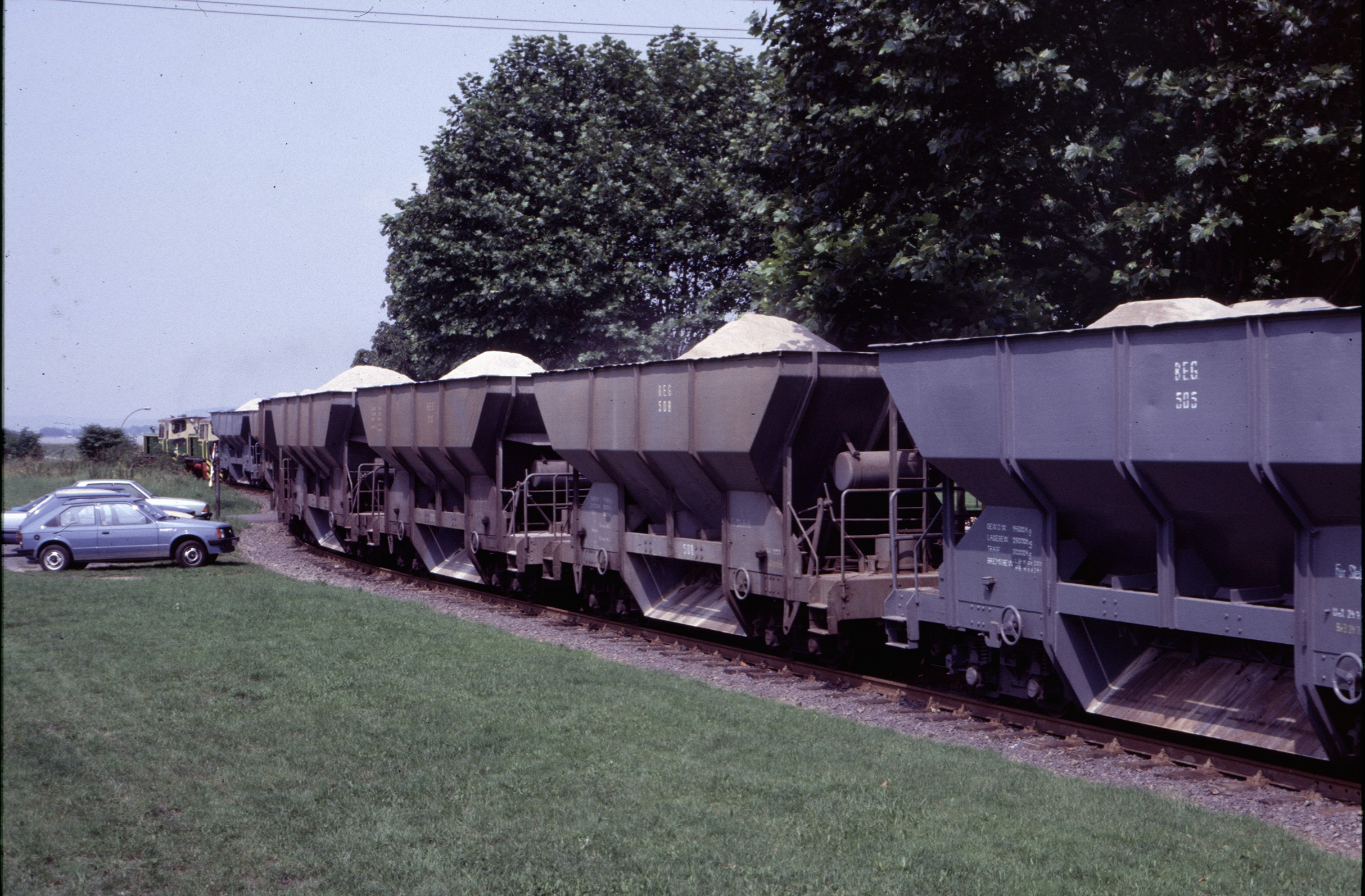 Hafenbahn Brohl 16.08.1984